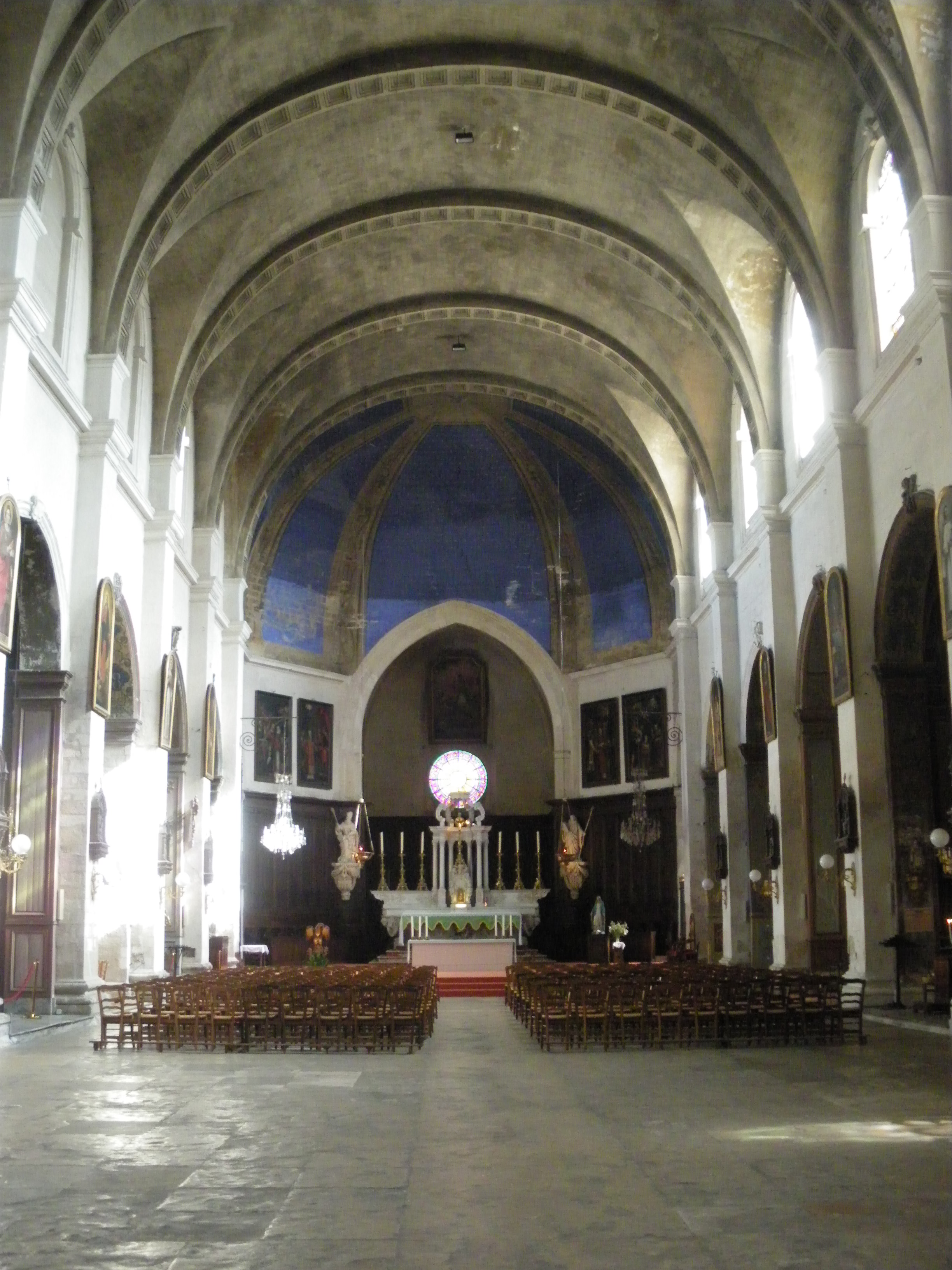 Nef de l'église Saint Symphorien, Avignon, Vaucluse, France